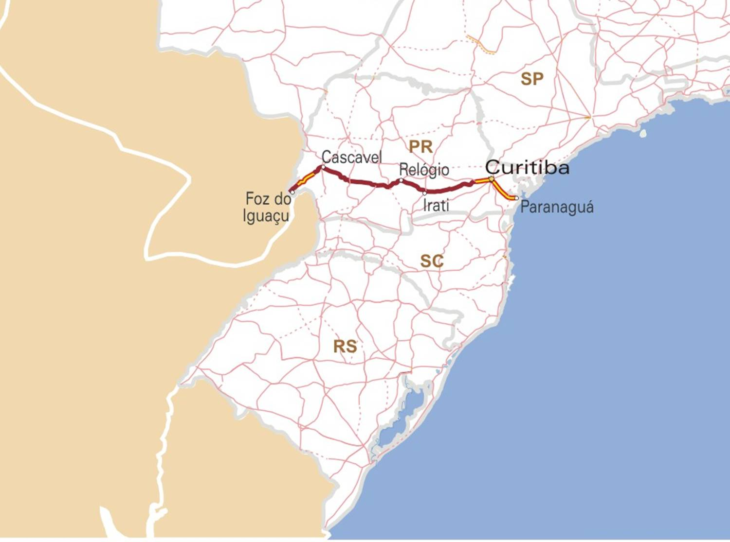 Mapa descritivo da BR-277 em relação as outras rodovias brasileiras.